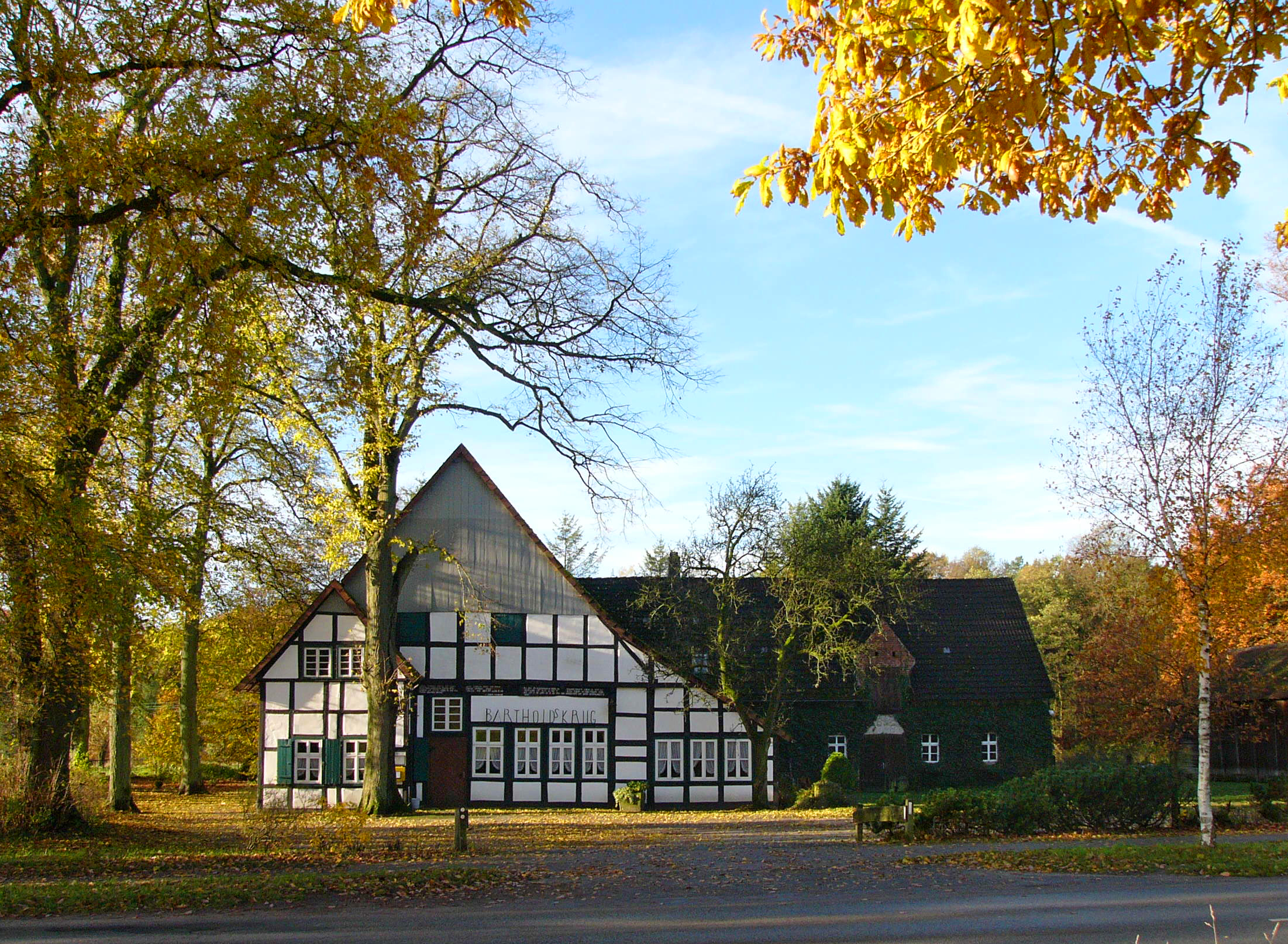 Bartholdskrug in Lipperreihe, Germany This is a photograph of an architectural monument.